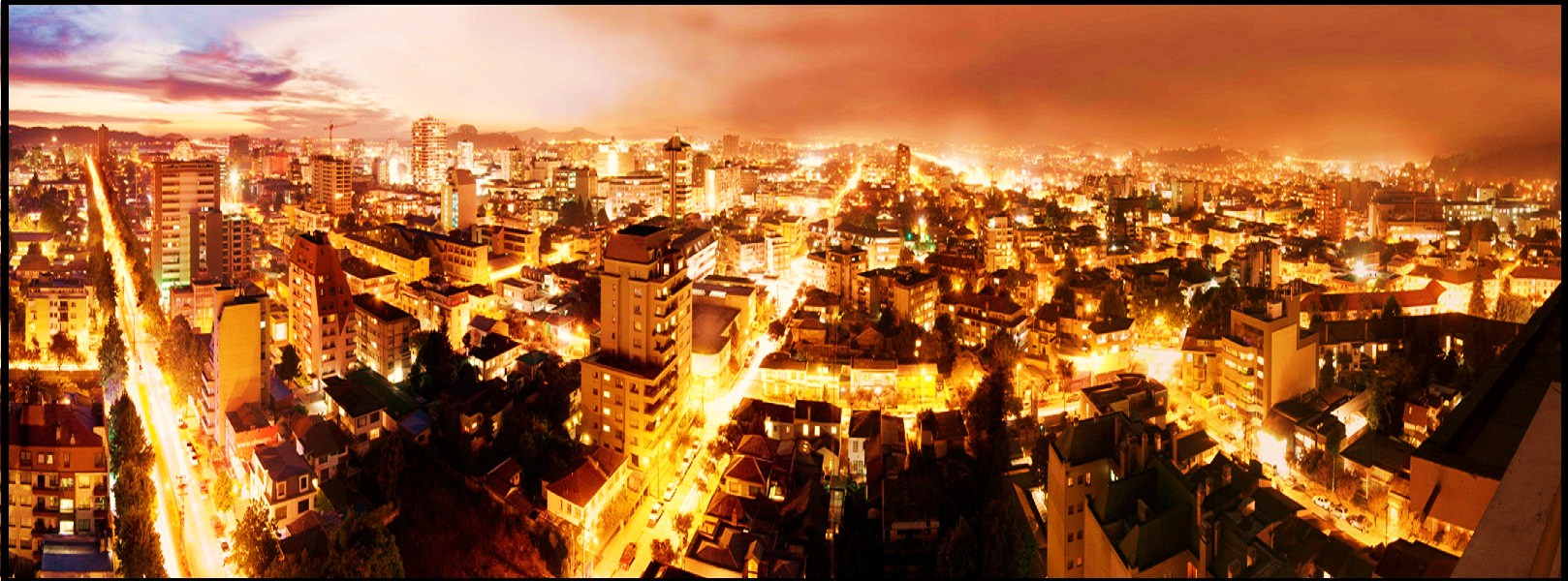 PANORAMICA